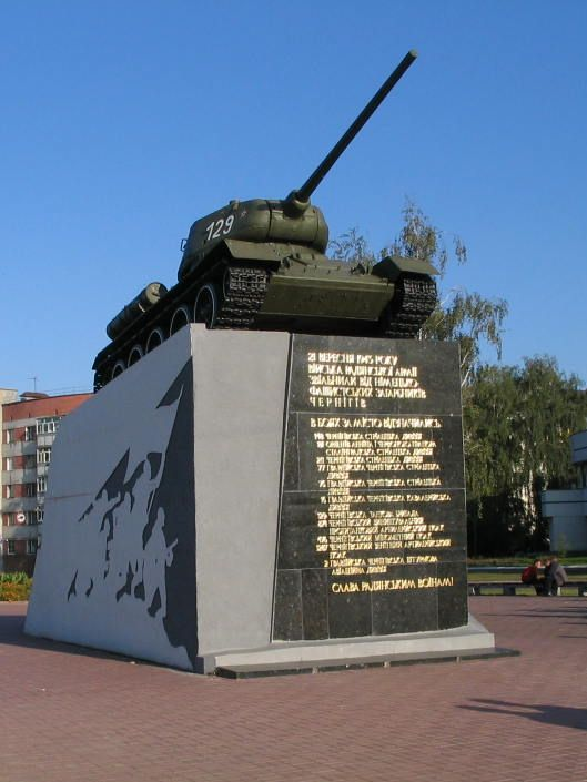 На площі Перемоги міста Чернігова встановлено монумент (Танк Т-34) з написом: "Воїнам – визволителям від трудящих Чернігова". На гранітній плиті золотими літерами вибито: "21 вересня 1943 року війська Радянської армії звільнили від німецько-фашистських загарбників Чернігів. В боях за місто відзначились: 148 Чернігівська стрілецька дивізія; 181 Орденів Леніна і Червоного прапора Сталінградська стрілецька дивізія; 211 Чернігівська стрілецька дивізія; 77 Гвардійська Чернігівська стрілецька дивізія; 76 Гвардійська Чернігівська стрілецька дивізія; 16 Гвардійська Чернігівська кавалерійська дивізія; 129 Чернігівська танкова бригада; 874 Чернігівський винищувальний протитанковий артилерійський полк; 476 Чернігівський мінометний полк; 1287 Чернігівський зенітний артилерійський полк; 2 Гвардійська Чернігівська штурмова авіаційна дивізія. Слава радянським воїнам!"